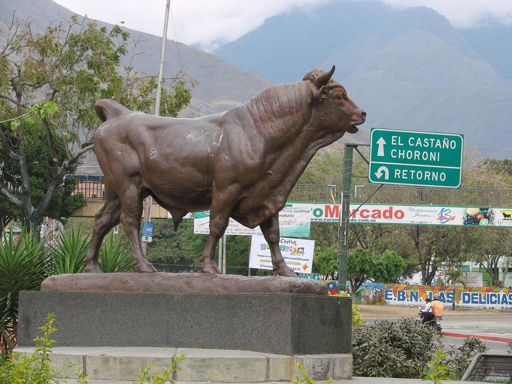 Toro de Las Delicias, Maracay, Venezuela.